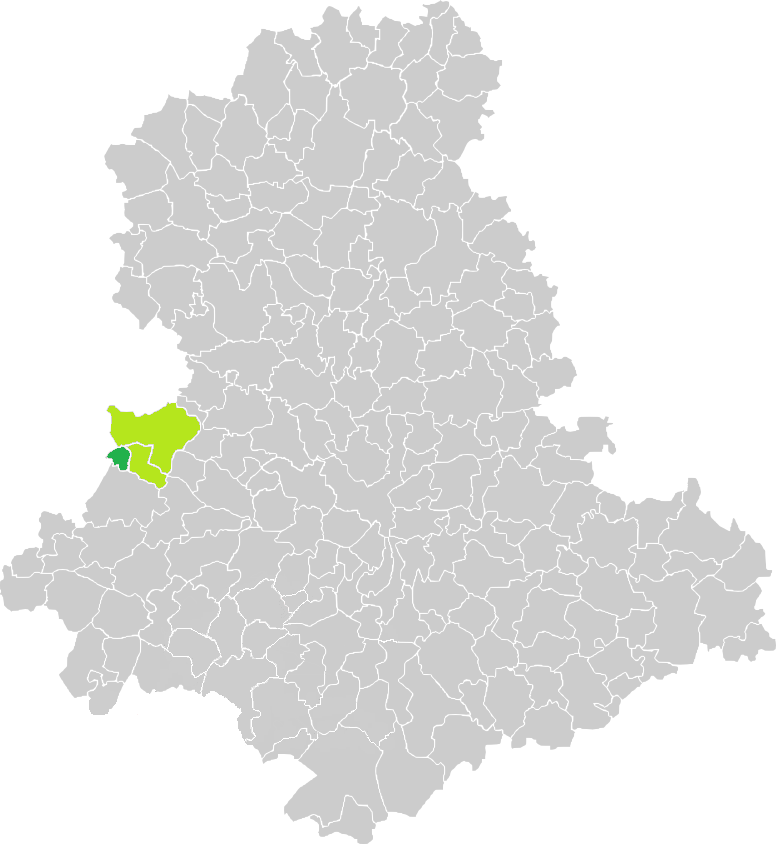 Carte de situation de la commune de Saillat-sur-Vienne (en vert foncé) dans le votre Canton (en vert clair) sur une carte des communes de la Haute-Vienne